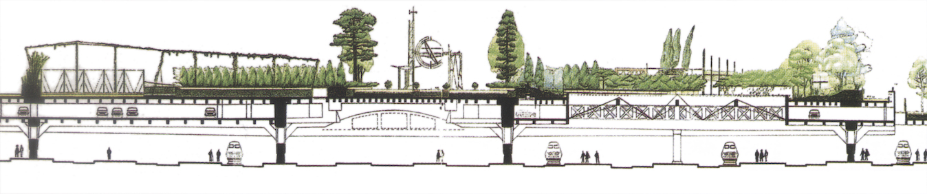 Dessin en coupe de la dalle portant le parking et le jardin construits au dessus des voies de la gare Montparnasse en 1990.